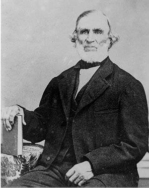 Rix Robinson, (1789-1875)